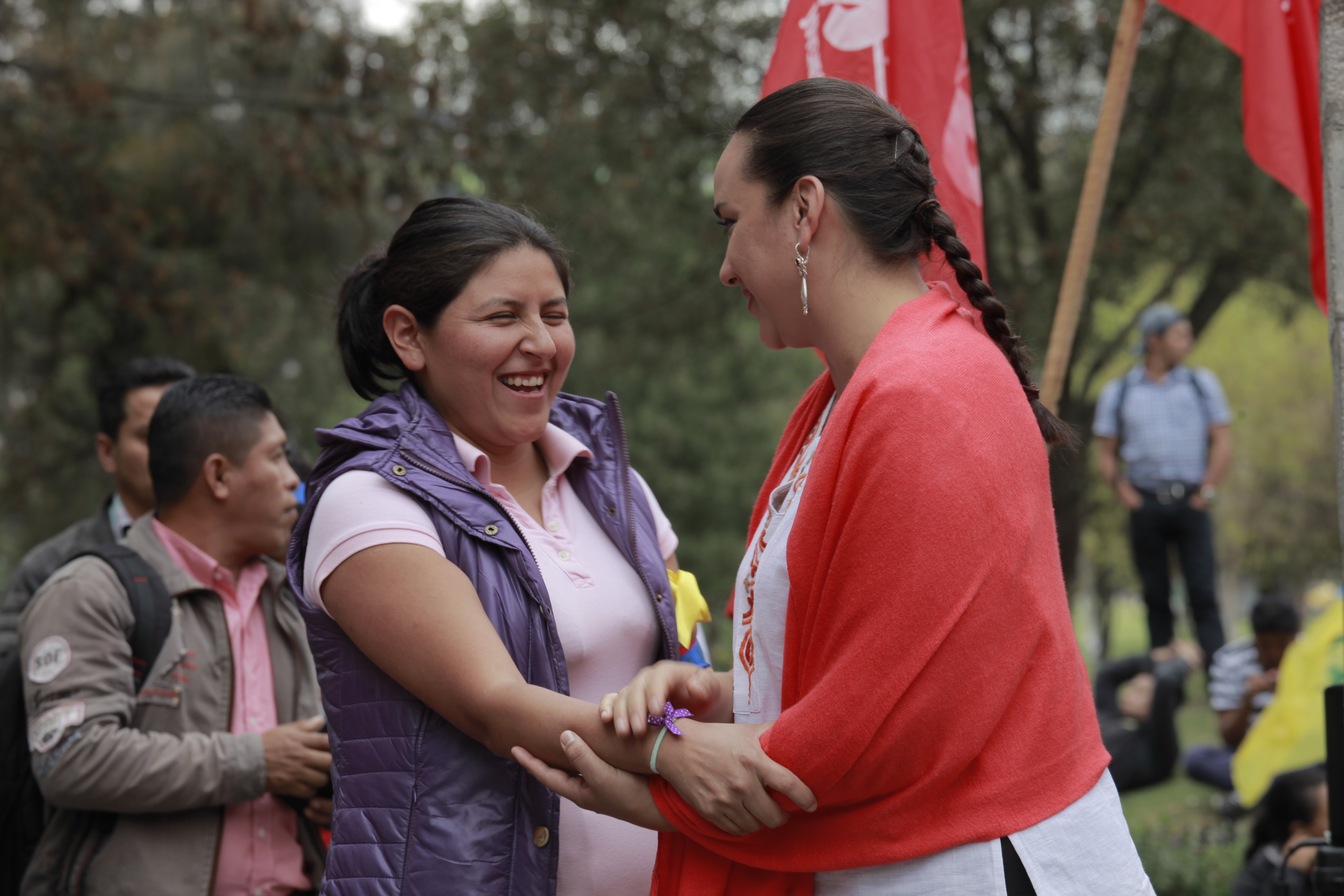 Presidenta de Congreso Gabriela Rivadeneira recibe el Manifiesto del Pacto Montonero en el parque El Ejido. Fotografía: Alberto Romo/Asamblea Nacional